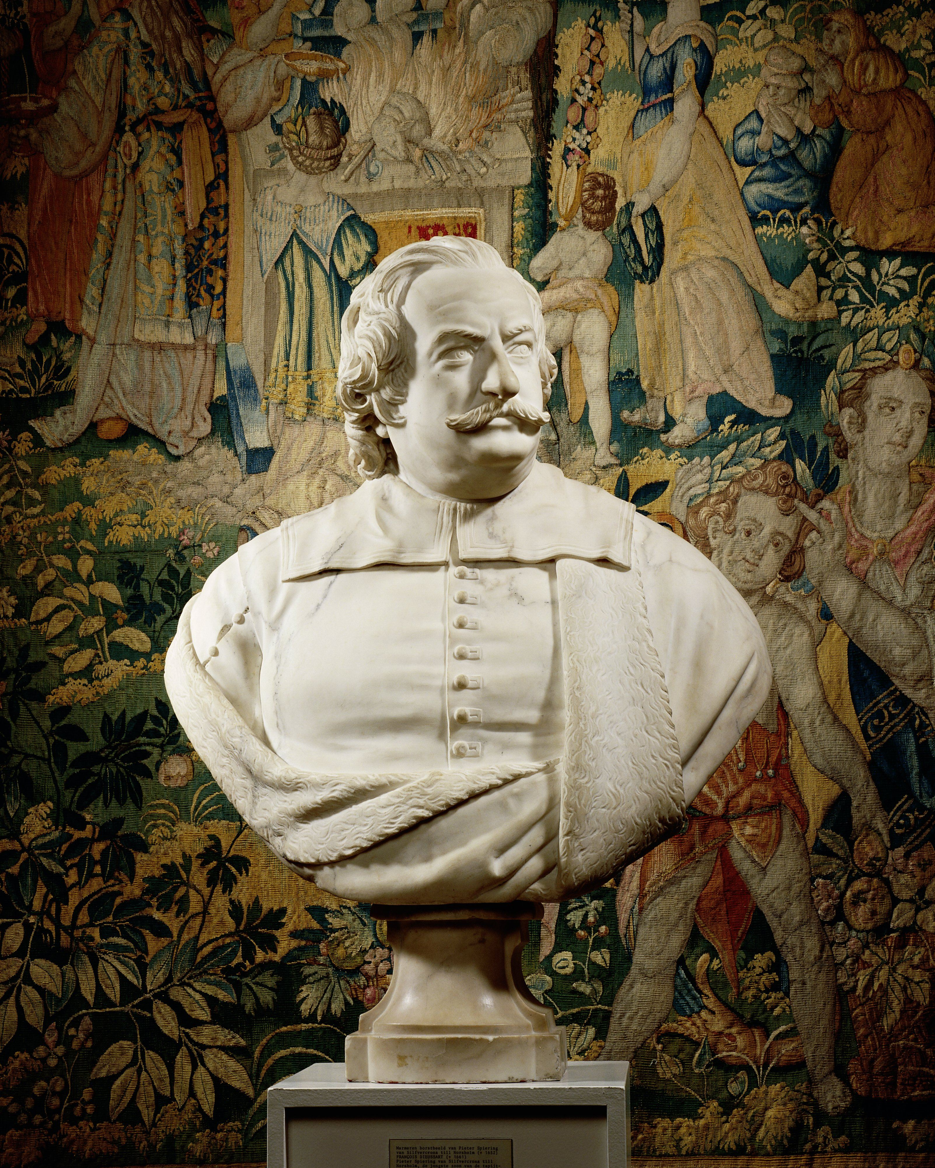 IdentificatieTitel(s): Portret van Pieter SpieringPortret van Pieter Spiering (?-1652)Objecttype: beeldhouwwerk Objectnummer: BK-1971-115-AOmschrijving: De man is frontaal afgebeeld, het hoofd naar rechts gewend. Zijn wenkbrauwen zijn enigzins gefronst. Hij heeft een grote snor en golvend haar, dat tot op de schouders valt. Over zijn met knopen gesloten buis met splitmouwen draagt hij een met bont gevoerde mantel. De platte kraag is over de mantel gelegd. Op geprofileerd, ingezwenkt voetstuk.VervaardigingVervaardiger: beeldhouwer: François DieussartDatering: ca. 1645 - ca. 1650Fysieke kenmerken: marmerMateriaal: marmer Afmetingen: h 89,0 cm. × b 65,0 cm. × d 32,0 cm. grondvlak: b 22,0 cm. × d 22,5 cm. OnderwerpWat: historical persons (+ (full) bust portrait)Wie: Pieter SpieringVerwerving en rechtenCredit line: Aankoop met steun van de Stichting tot Bevordering van de Belangen van het RijksmuseumVerwerving: aankoop 1971Copyright: Publiek domein